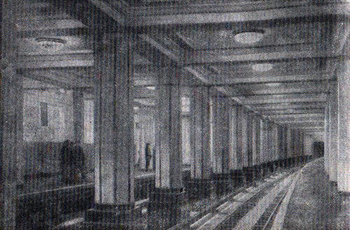 "Александровский сад" в 1935 годуСтанция метро "Александровский сад" в 1935 году